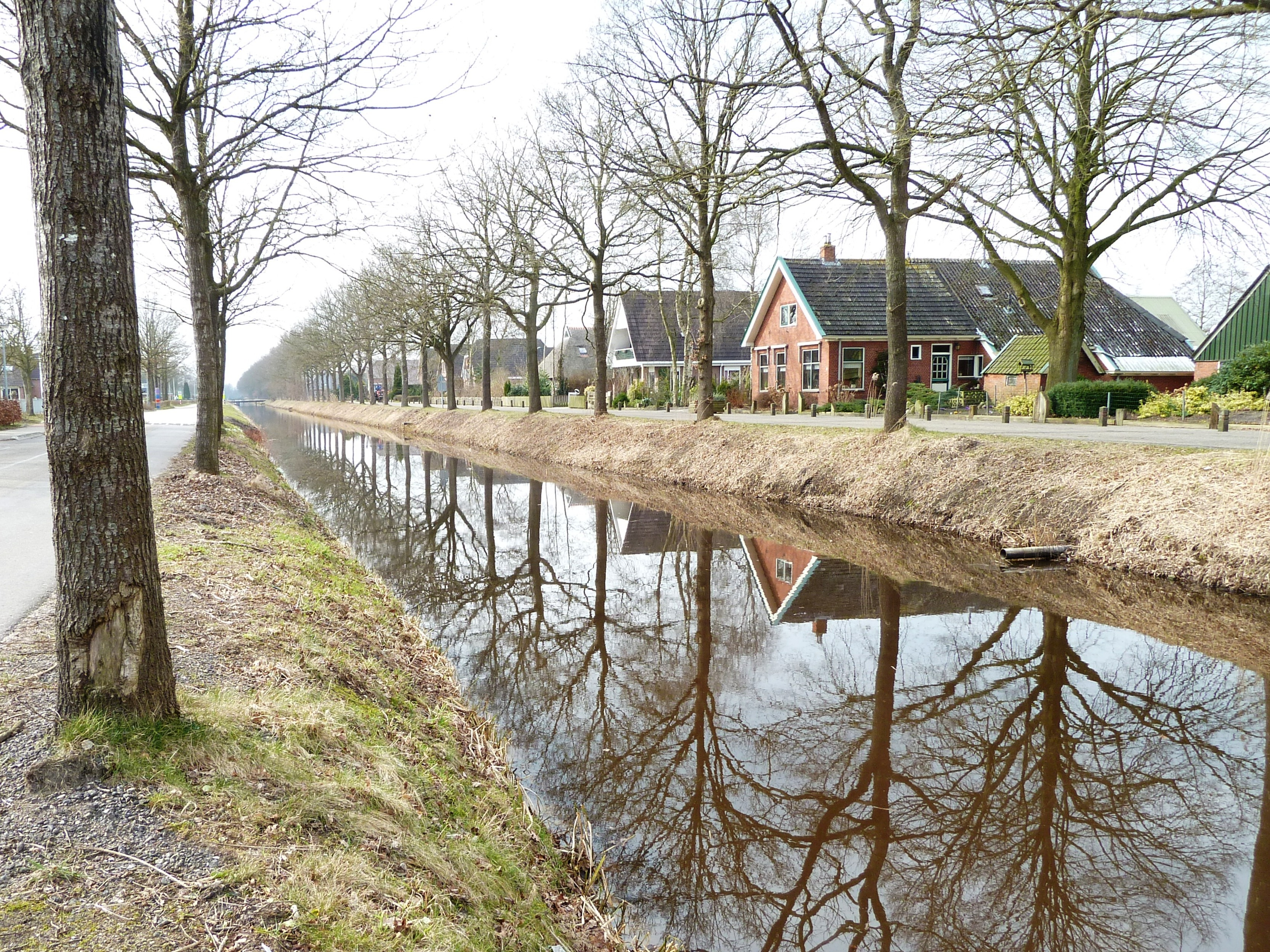 Huizen langs het water in het dorpje Jonkersvaart (Marum, Groningen, Nederland).